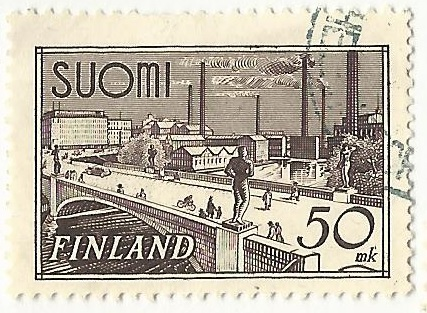 Postimerkki Hämeensilta ja sen Pirkkalaisveistokset (Wäinö Aaltonen), published 1968